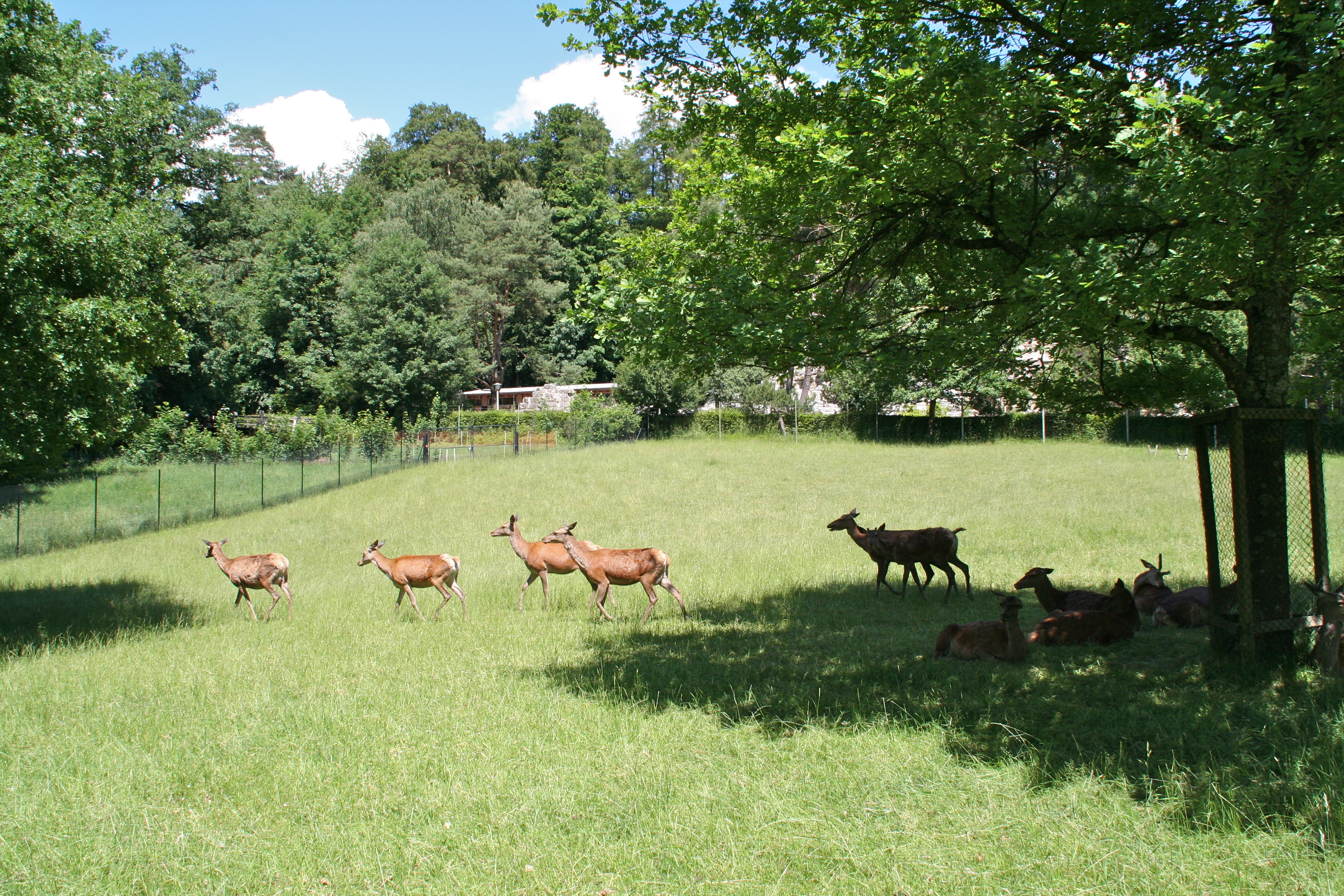 Wildpark Langenberg Damhirsche